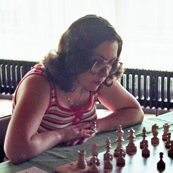 Nava Shterenberg 1982 in Bad Kissingen